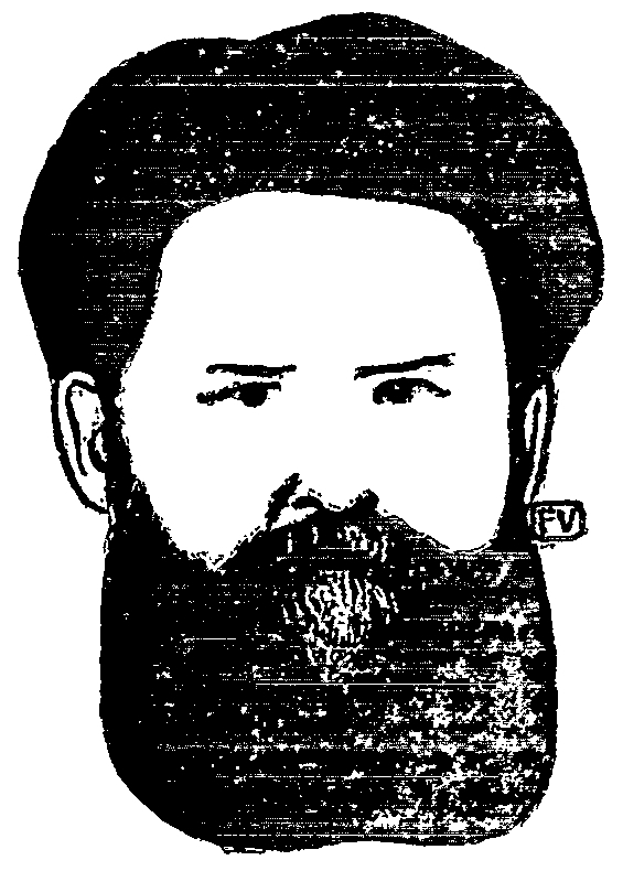 Portrait of Russian writer Vladimir Galaktionovich Korolenko (Короленко, Владимир Галактионович) (1853-1921) by Félix Valloton (1865-1925)